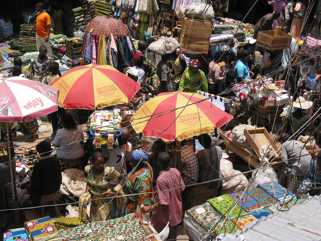 market, Lagos